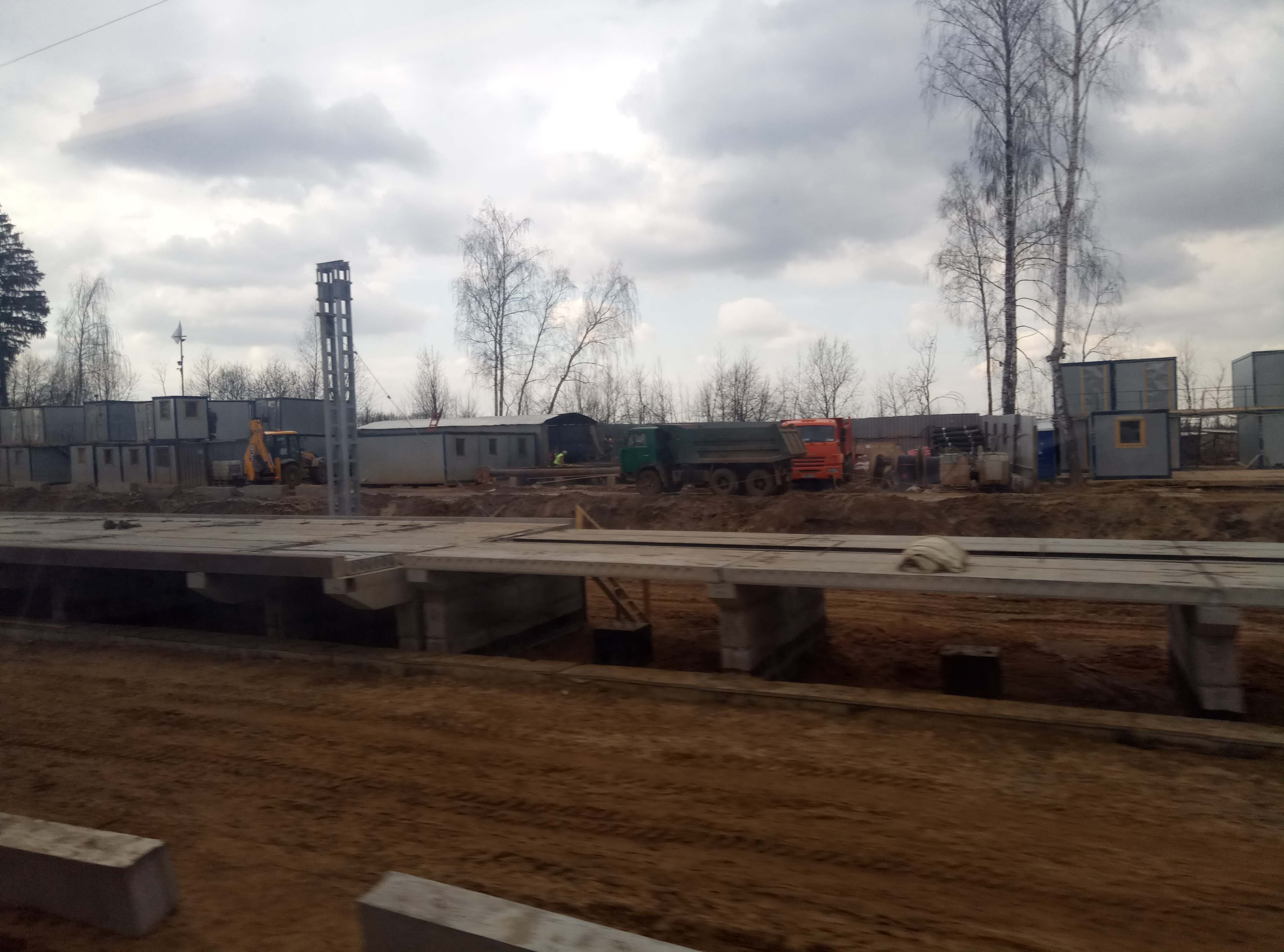 Санино стройка